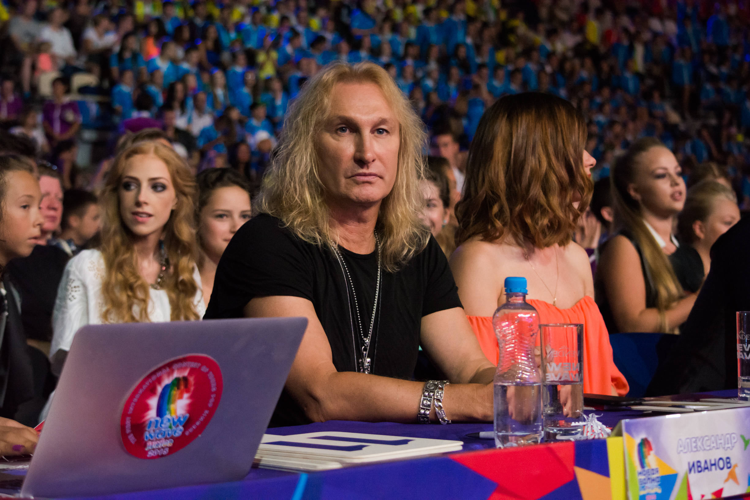 Александр Иванов в жюри на Детской Новой волне 2015